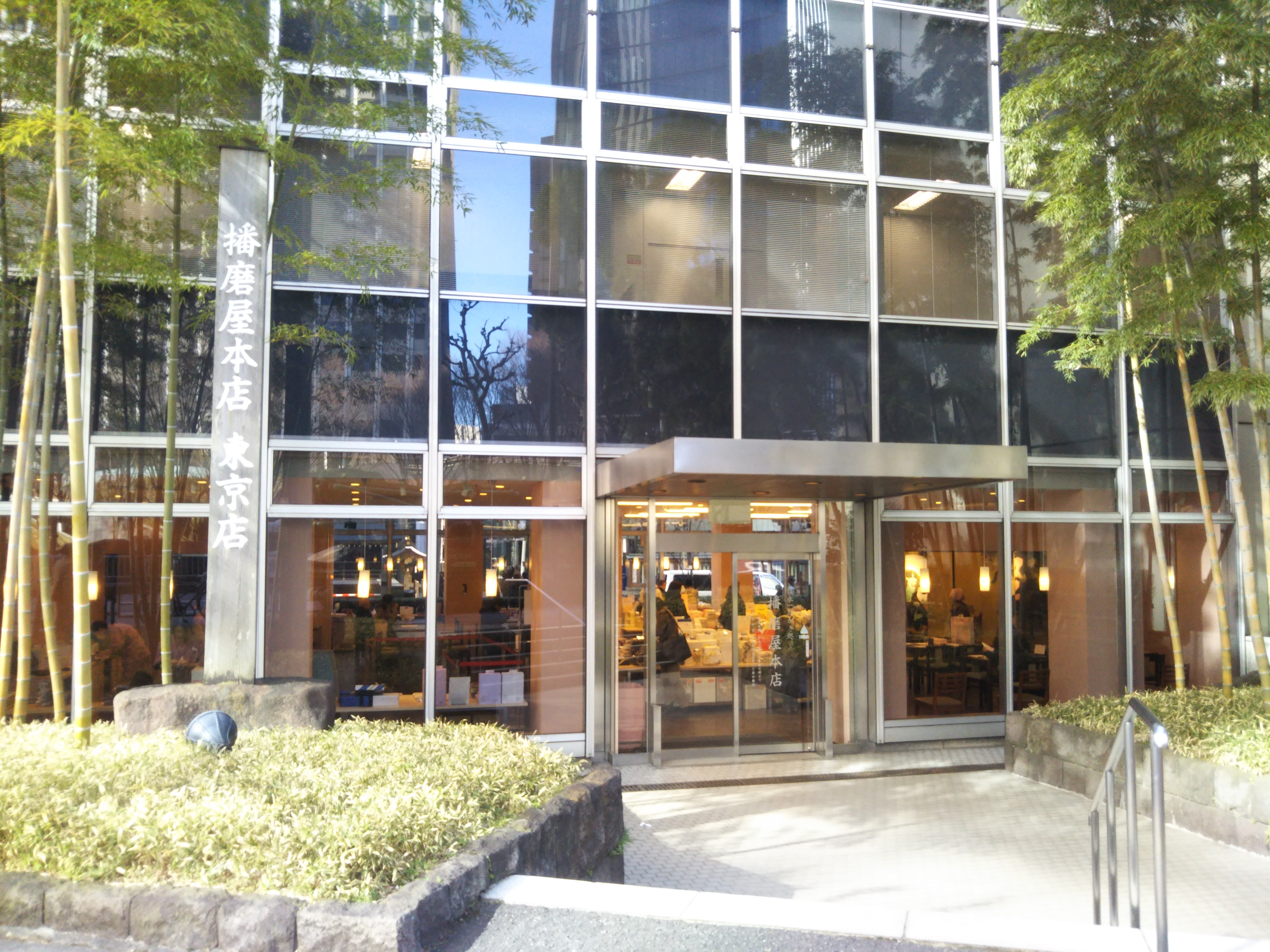 播磨屋本店東京店